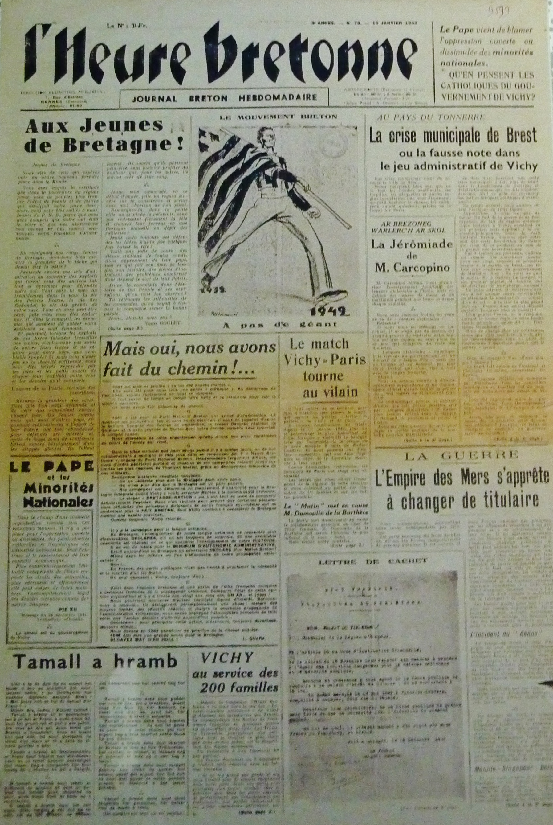 Première page d'un numéro de l'hebdomadaire L'Heure bretonne du 10 janvier 1942. Cette publication, dont le siège était à Rennes, qui est parue entre juillet 1940 et juillet 1944, était le journal du Parti national breton, parti collaborationniste pendant la Seconde Guerre mondiale.